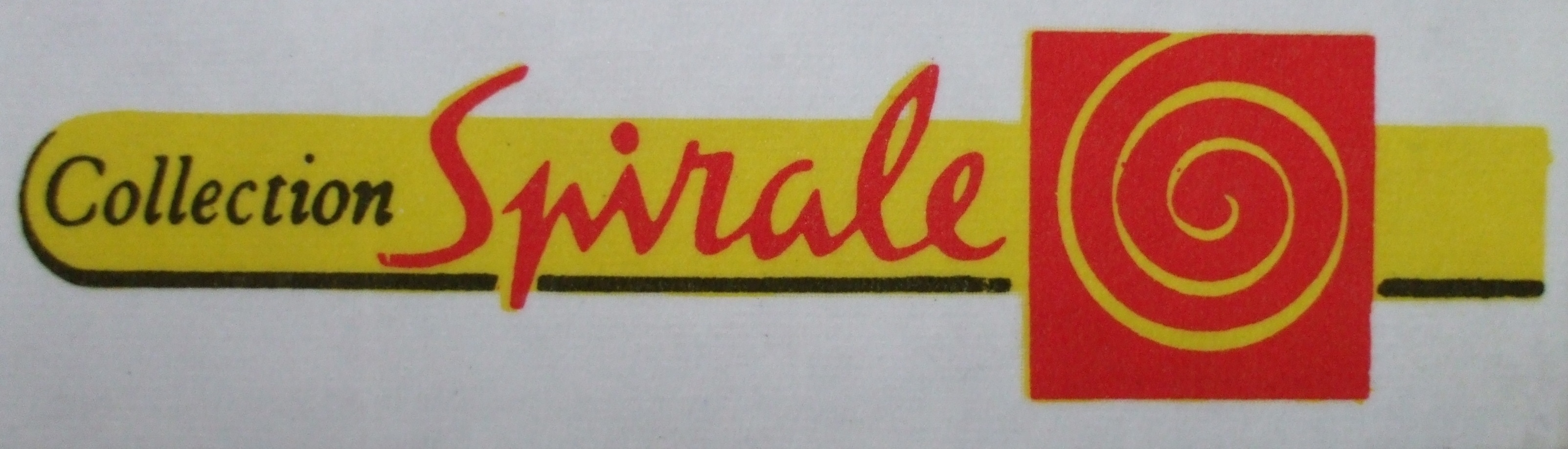 editions G.P.